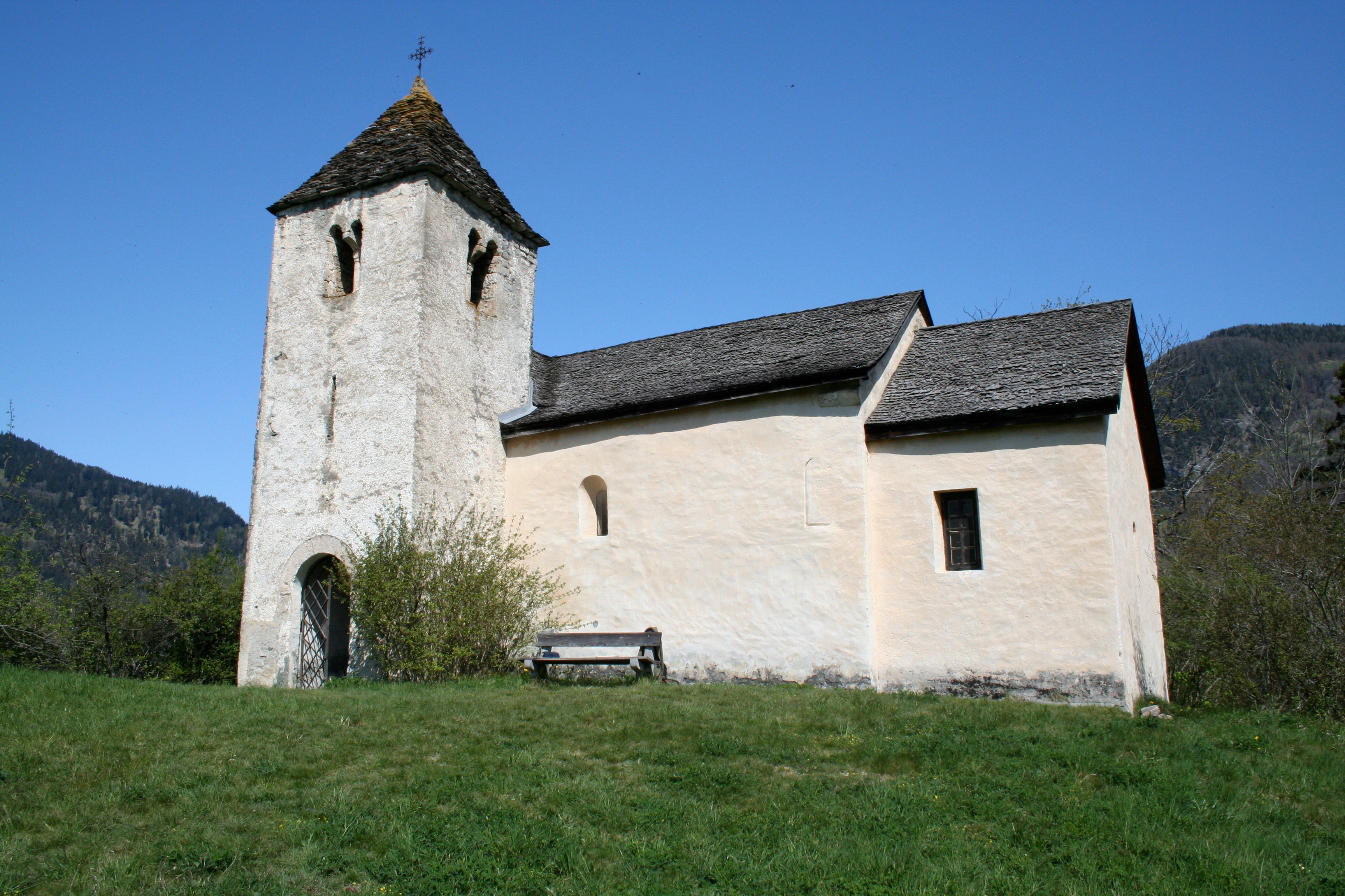 Kapelle St. Lorenz (Paspels) Ansicht von Süden